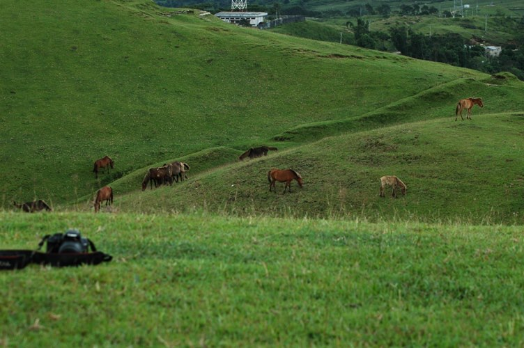 Lariguto valley, suco Ossu de cima, Osttimor